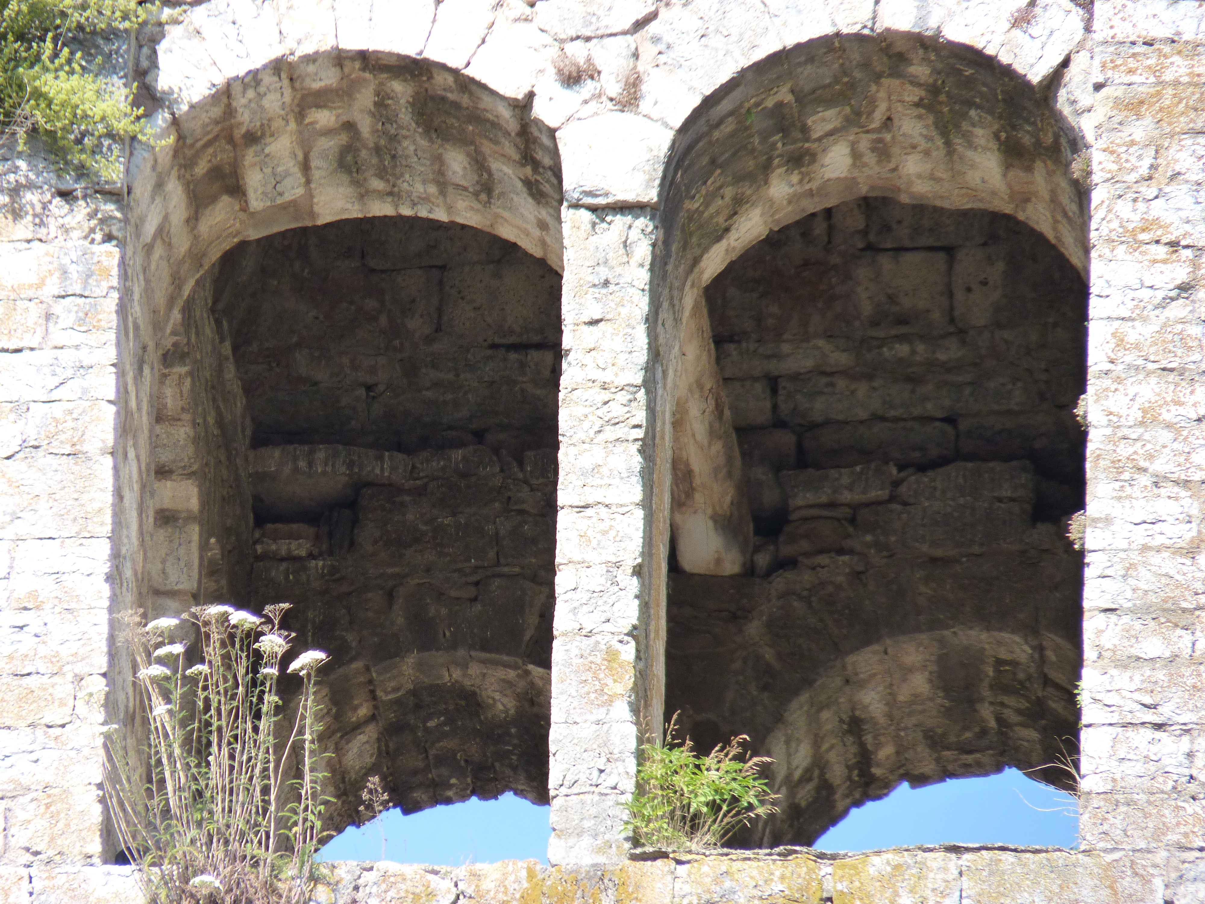 Campanar del monestir Sant Pere, Camprodon (Ripollès, Girona, Catalunya, Espanya)